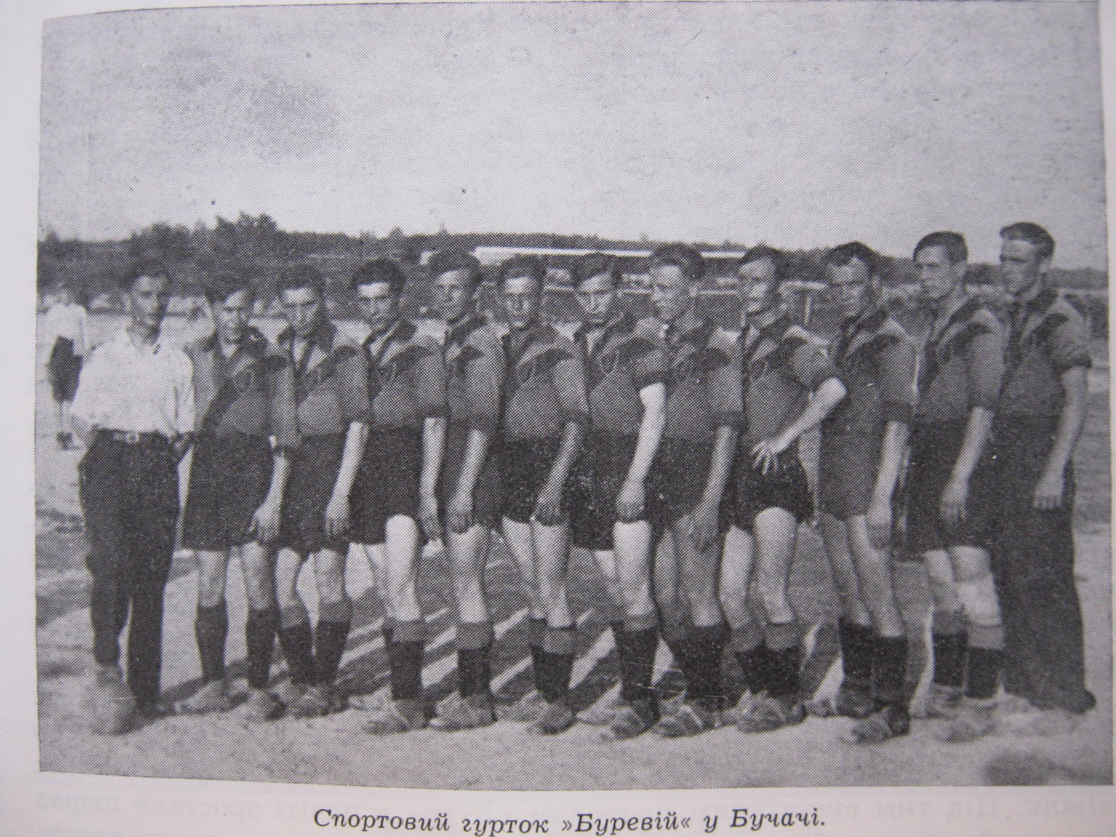 Команда копаного м'яча українського спортового гуртка "Буревій". Бучач